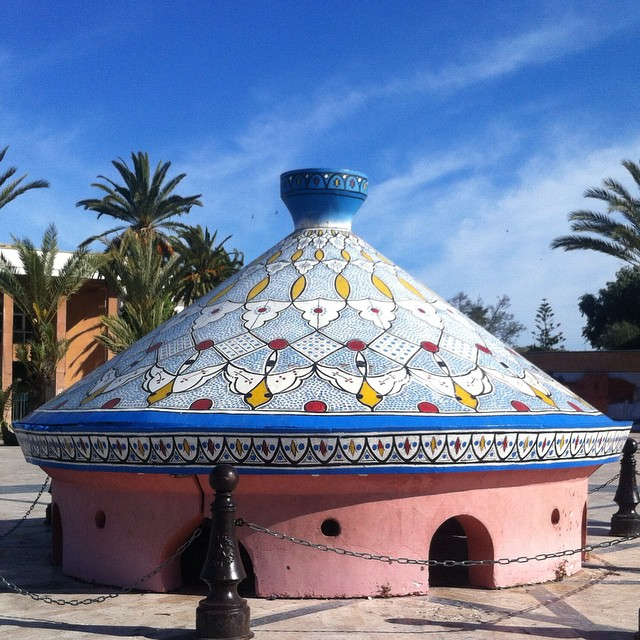 Le Tajine de Safi se trouvant à place Mohammed V. En juillet 1999, Safi a été inscrite dans le livre Guinness des records en réalisant le plus grand tajine de boulettes de sardines du monde. Deux cent femmes ont participé à la préparation de ce plat gigantesque. Selon les organisateurs, 12 tonnes de sardines et 500 kg de graisse animale ont été nécessaires à la fabrication de 6 tonnes de boulettes. Son couvercle seul fait 6,30 m de diamètre et 4,5 m de hauteur. Le tajine géant, décoré par les meilleurs artistes potiers de la ville, trône sur la place Mohamed V.